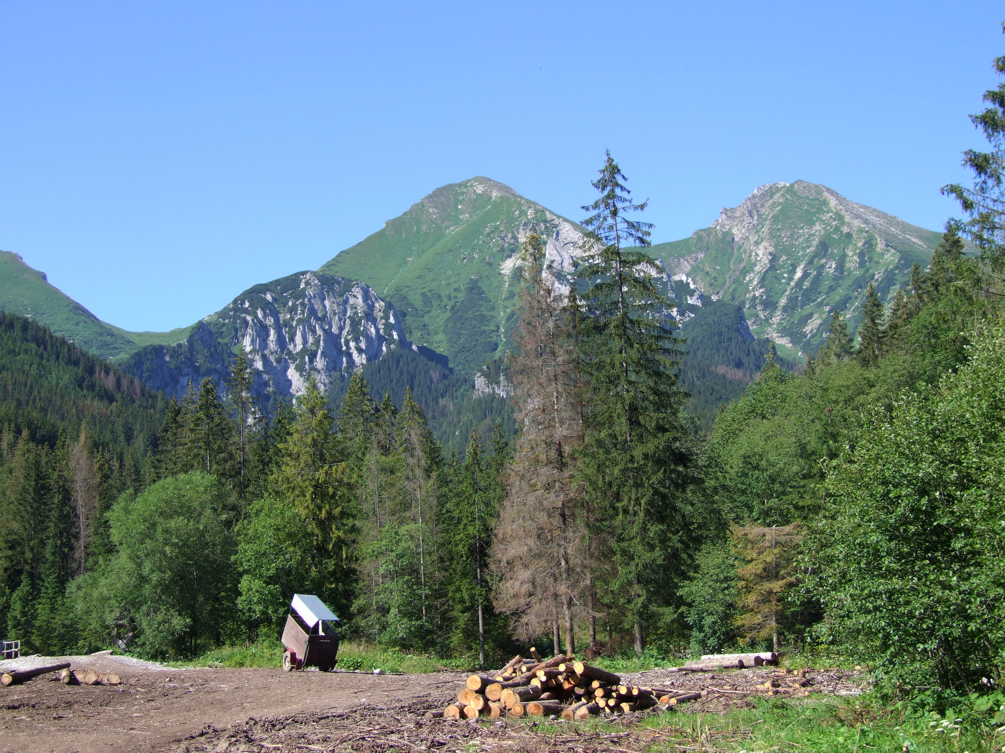 Dolina do Regli w Bielskich Tatrach. Od lewej:Szeroka Przełęcz, Głosna Skała (poniżej po prawej), Płaczliwa Skała i Hawrań